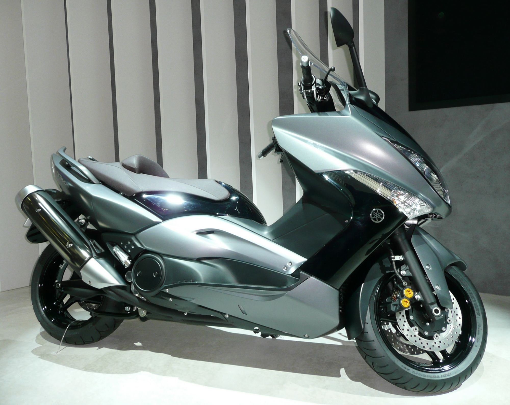 Yamaha T-MAX 2008 (2007 Tokyo Motor Show)